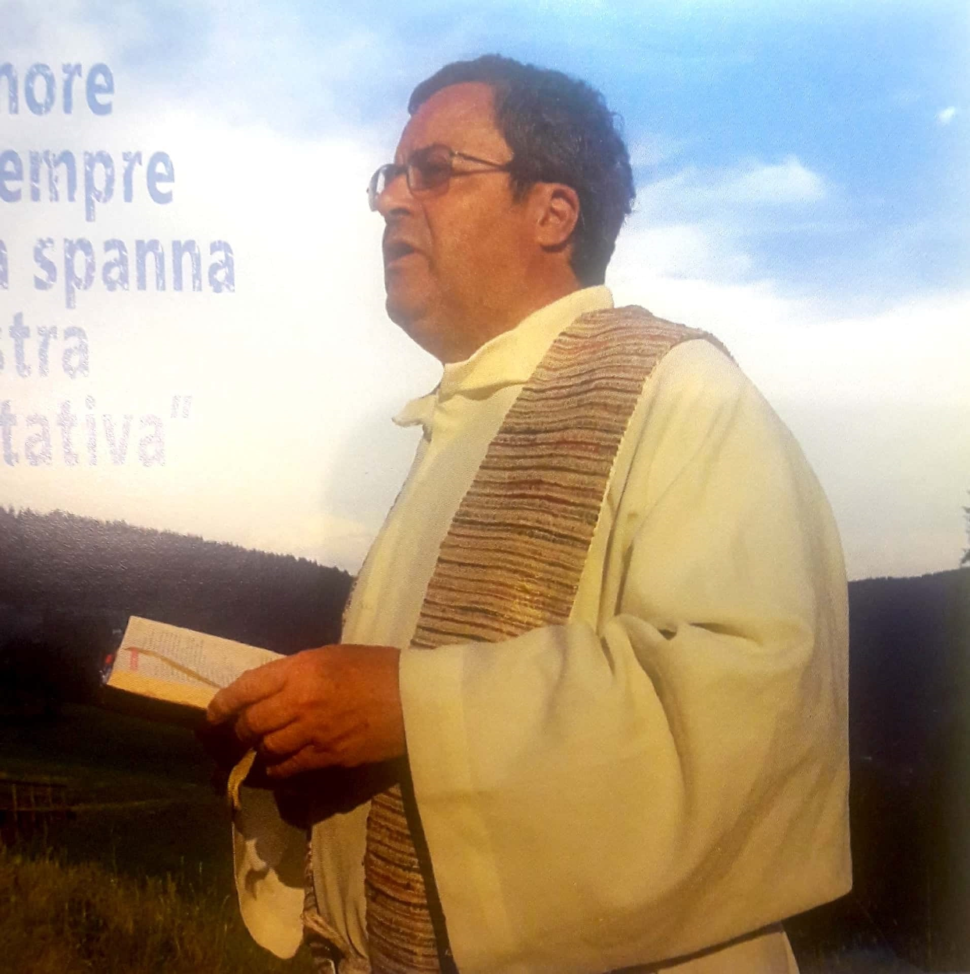 Padre Modesto Paris durante la S. Messa a Rumo (TN)